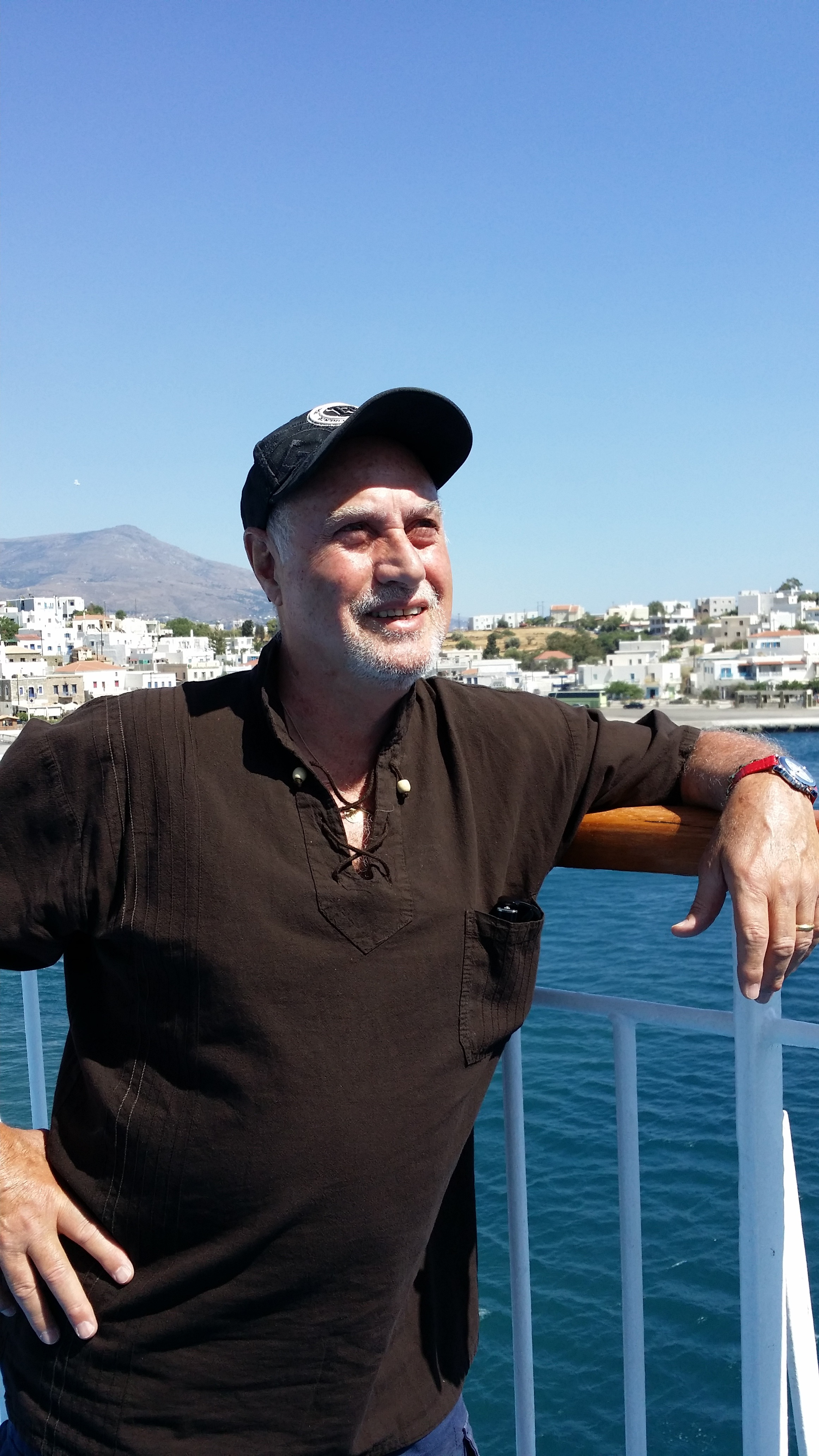 Luigi Fontanella nel 2014